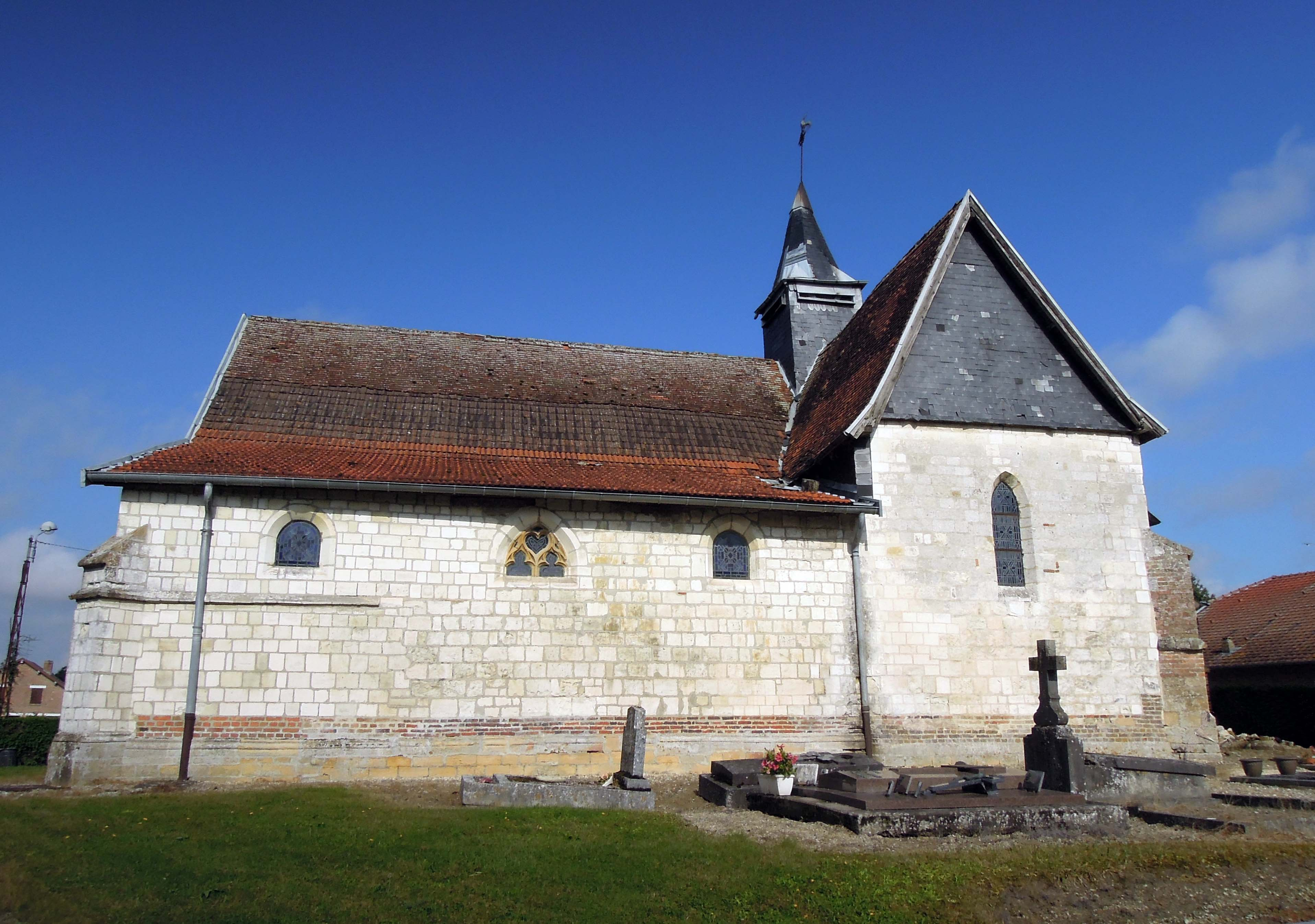 Église Saint-Remi, (Inscrit, 1926) .